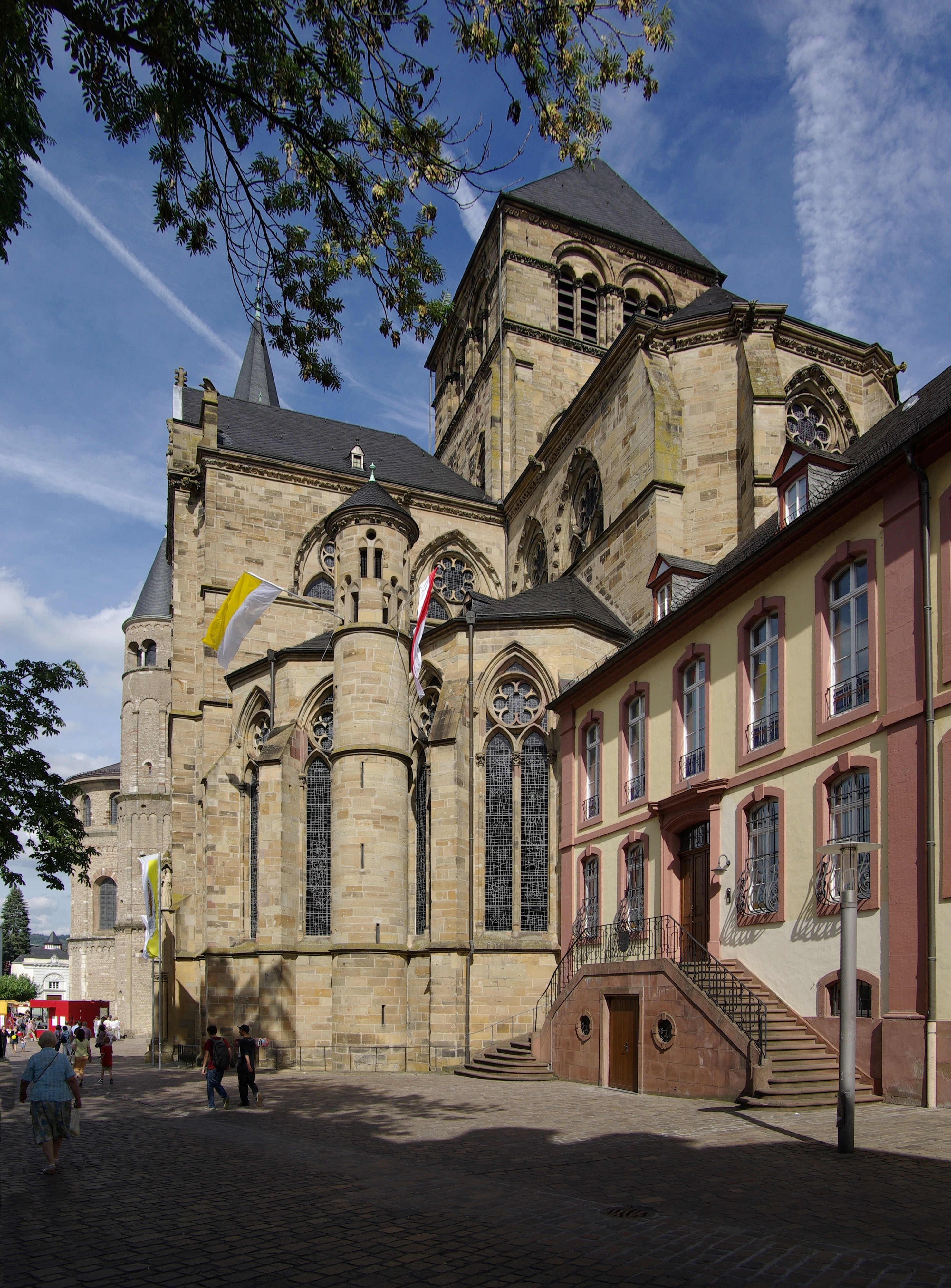 Trier, Liebfrauenstraße 1: Katholische Pfarrkirche Liebfrauen, rechts davon Liebfrauenstraße 1: Bischofshof